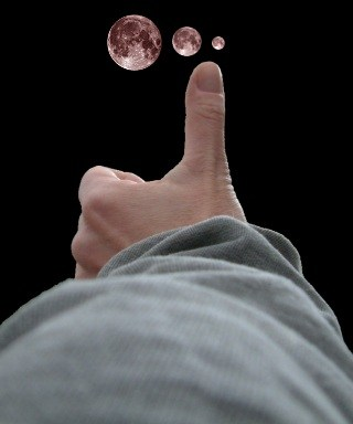 Häufige Fehleinschätzung der Größe des Mondes im Vergleich mit der Breite des Daumens bei ausgestreckter Faust (richtig ist die kleinste Mond-Scheibe).